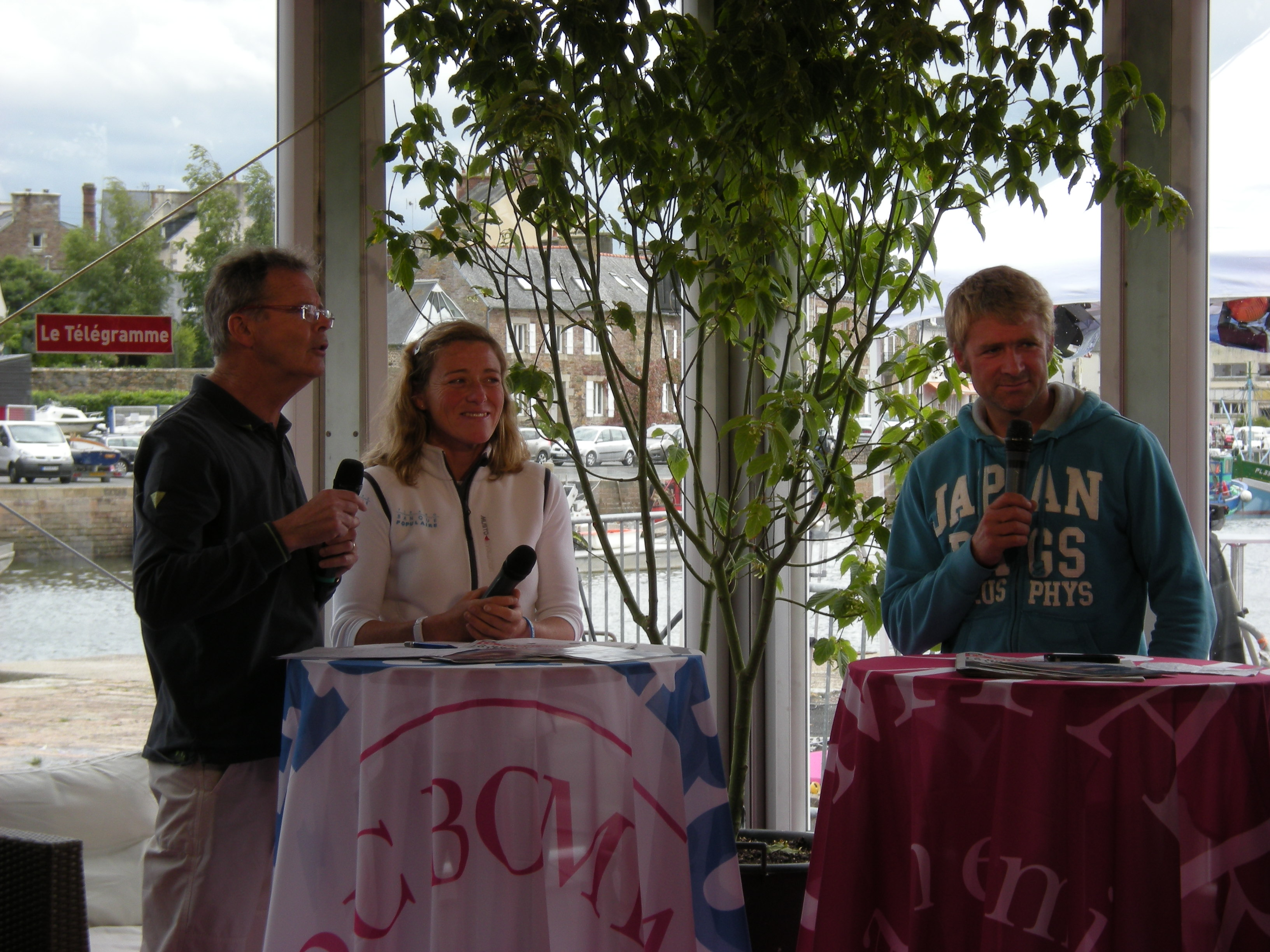 Les skippers Jeanne Grégoire (à gauche) et Yann Eliès (à droite) lors d'un reportage de TEBEO/Le Télégramme avant le départ de la Solitaire du Figaro 2012 de Paimpol